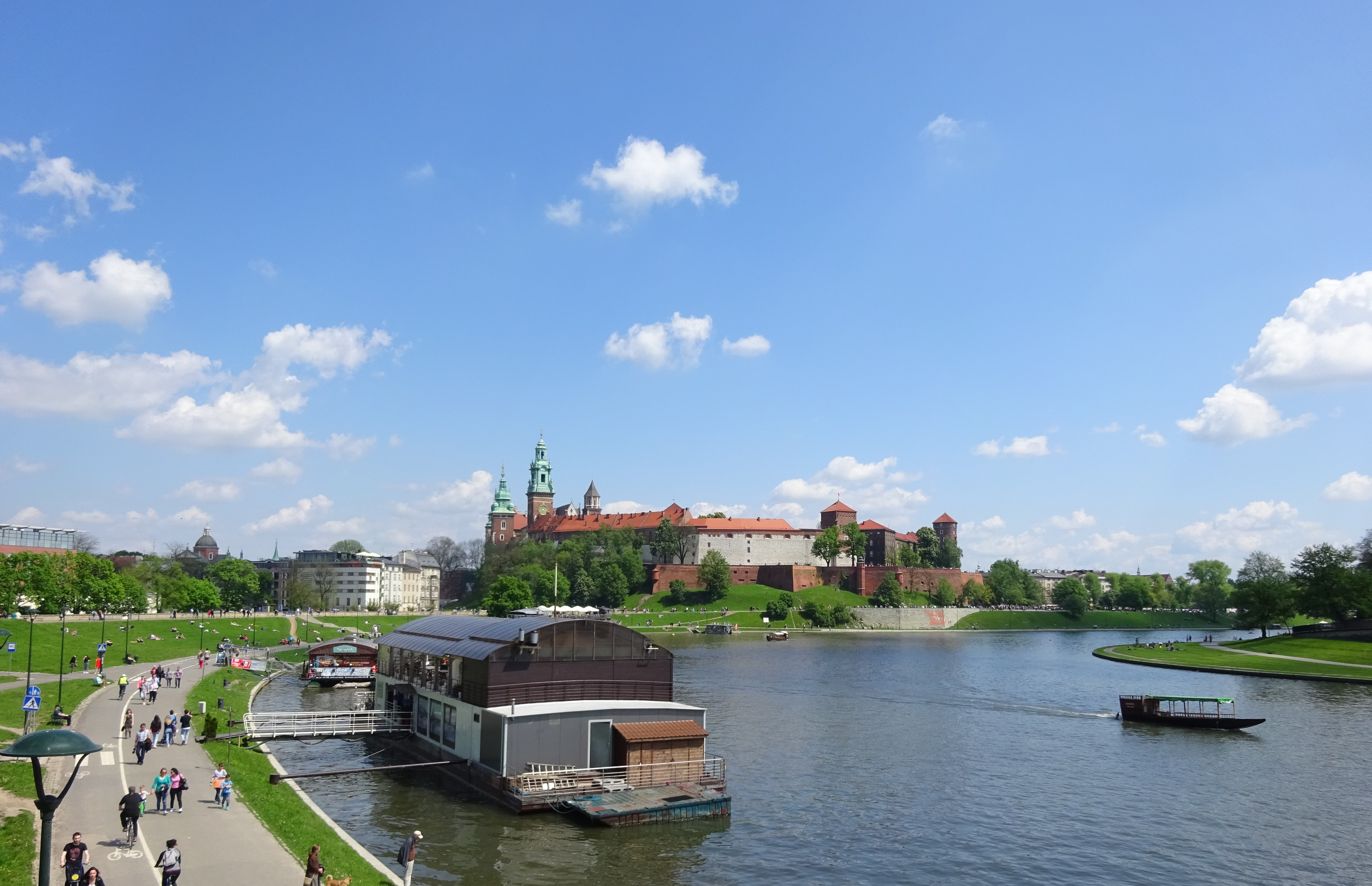 Widok na Bulwary Wiślane w Krakowie z Mostu Dębnickiego. Po lewej stronie rzeki Bulwar Czerwieński, po prawej Bulwar Poleski. 2017